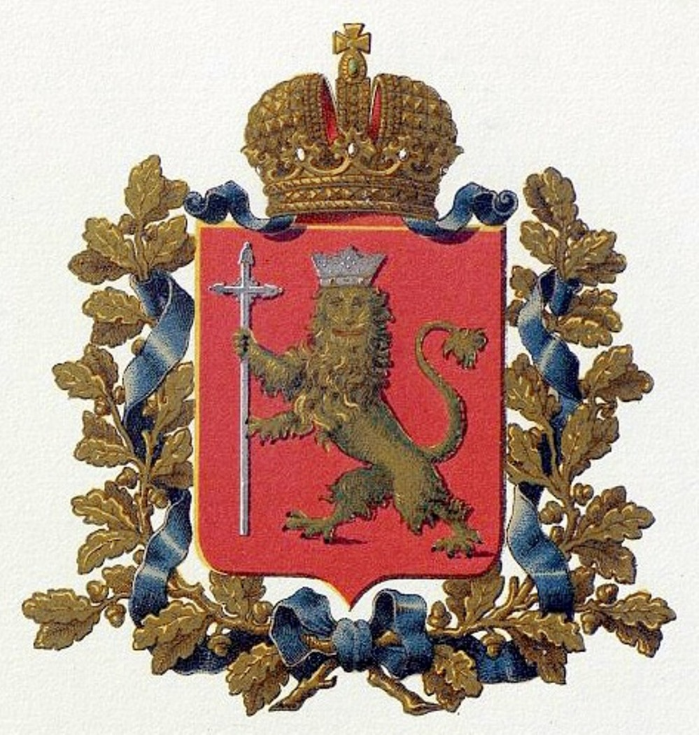 Official Russian Empire coat of arms Vladimir Governorate. Герб Российской Империи Владимирской губернии в Гербовнике Бенке МВД. Утверждён Императором Всероссийским Александром Вторым.